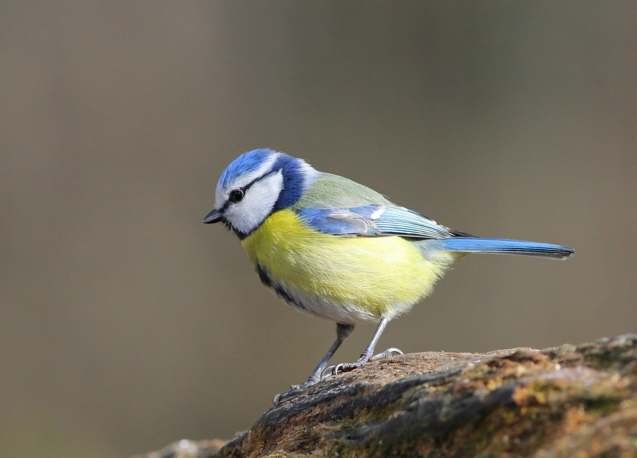 Mésange bleue | Parus caeruleus